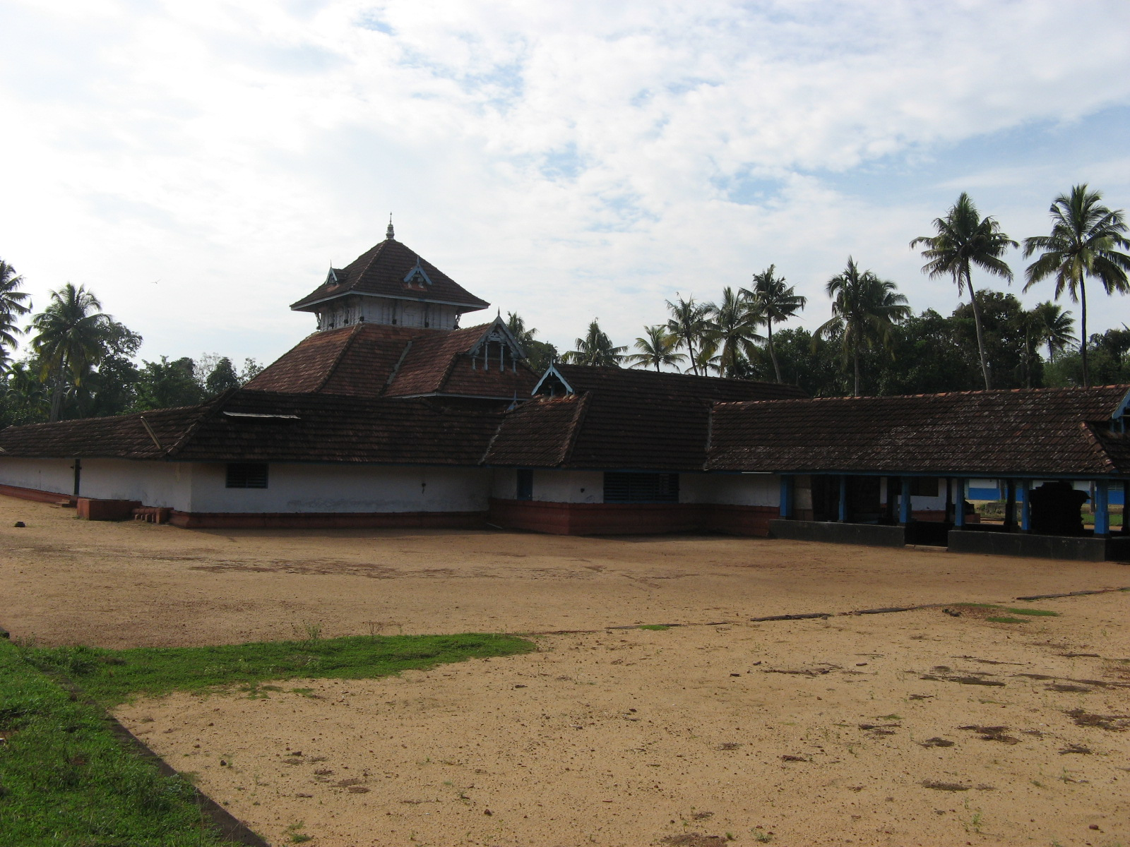 കുഴൂർ ശ്രീ സുബ്രമണ്യ സ്വാമി ക്ഷേത്രം